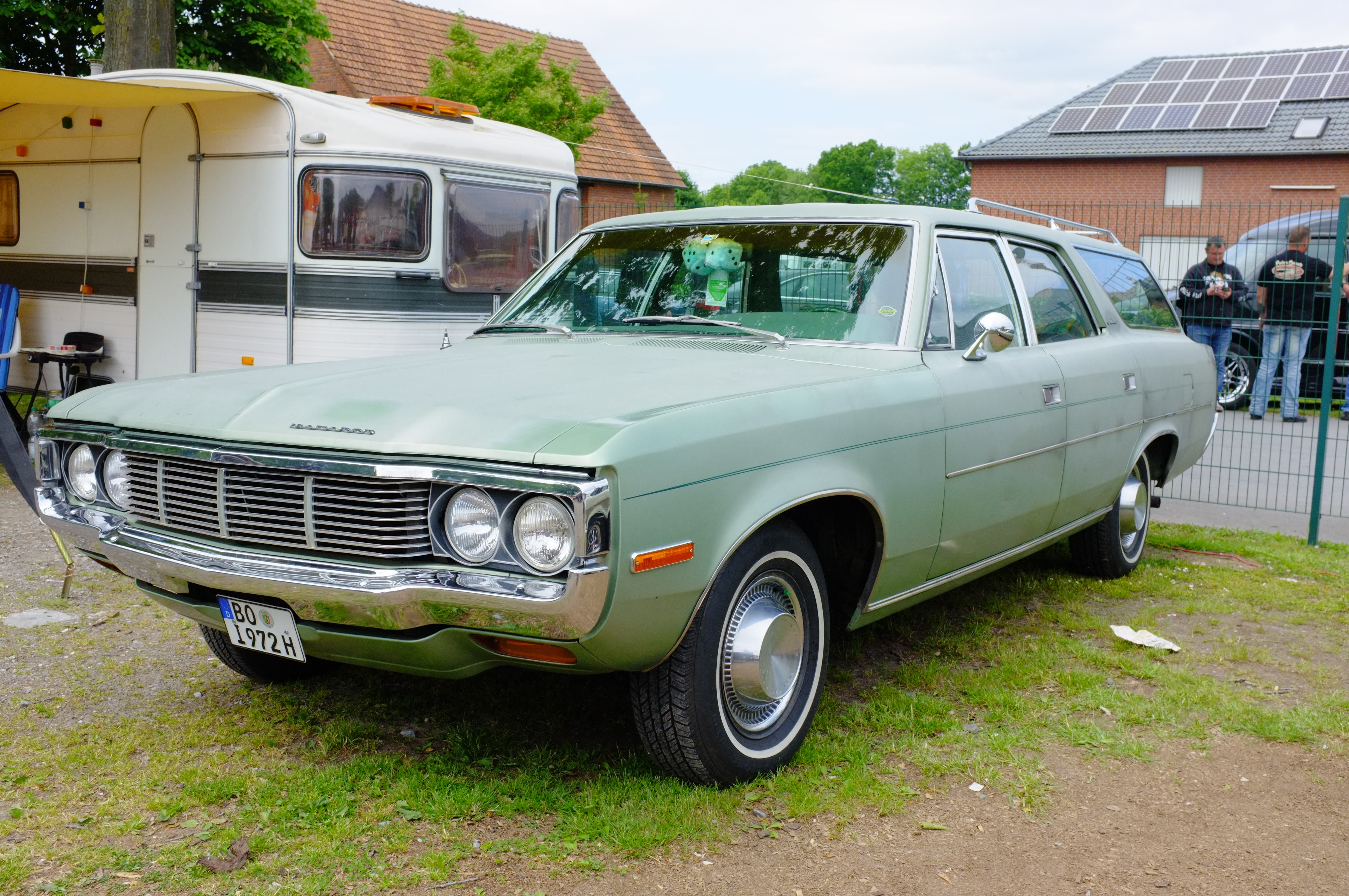 Straßenkreuzer Treffen, Kaunitz 2015